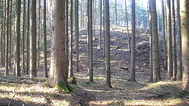 Burgstall Appertshausen (Petersdorf, Landkreis Aichach-Friedberg, Bayerisch-Schwaben). Der Burgstall von Osten. Eigene Aufnahme, Jan. 2008 / Former Appertshausen castle near Petersdorf (Landkreis Aichach-Friedberg, Bavaria, Germany). The castle from the east. Own photo, Jan. 2008